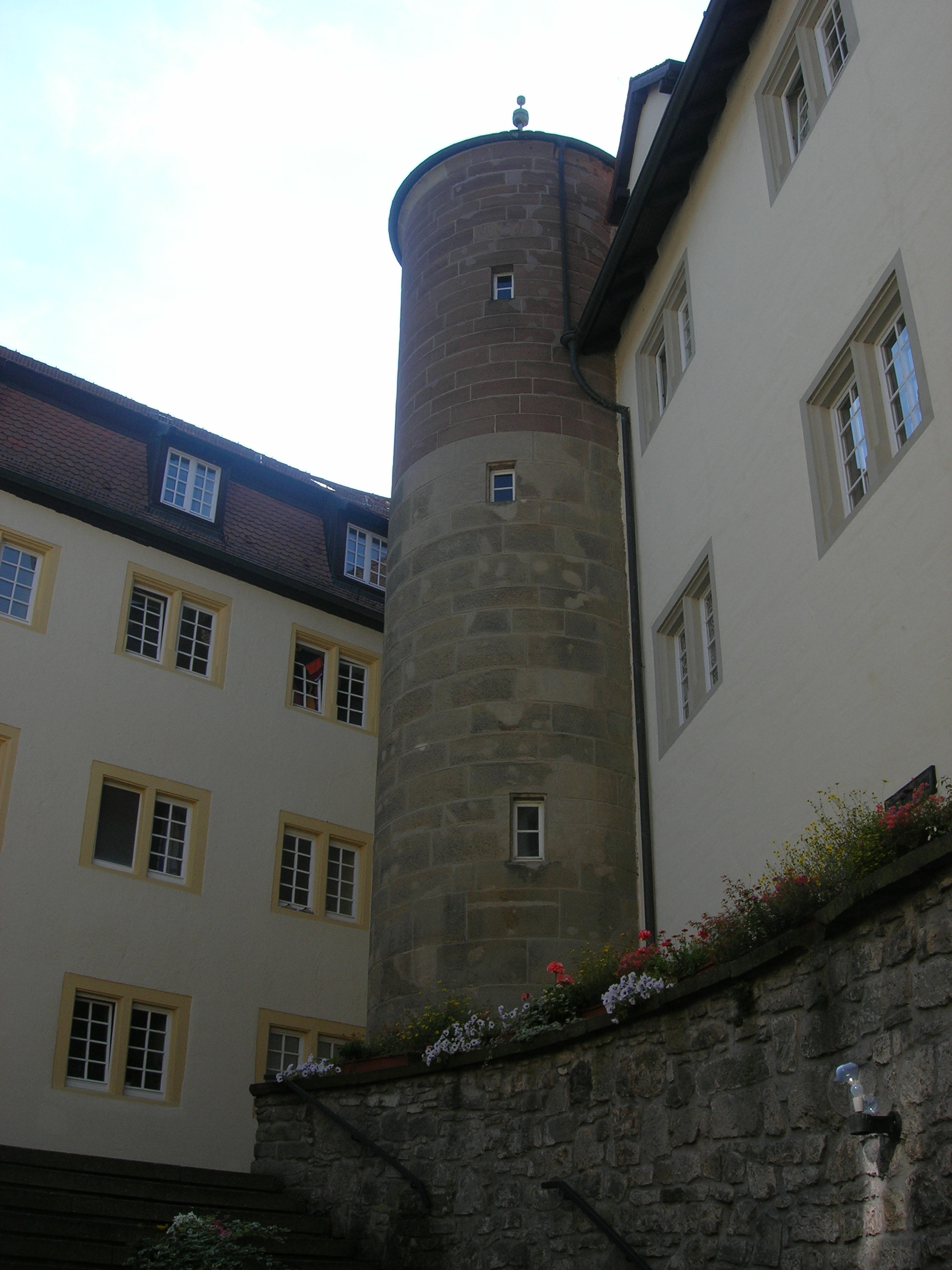 Schloss Kaltenstein - Vahingen an der Enz